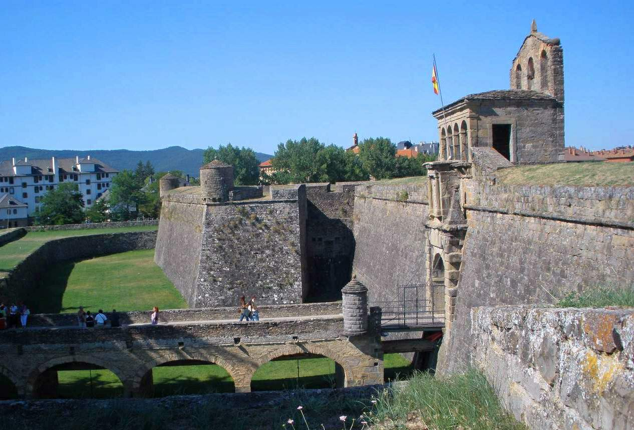 Ciudadela de Jaca (Huesca)